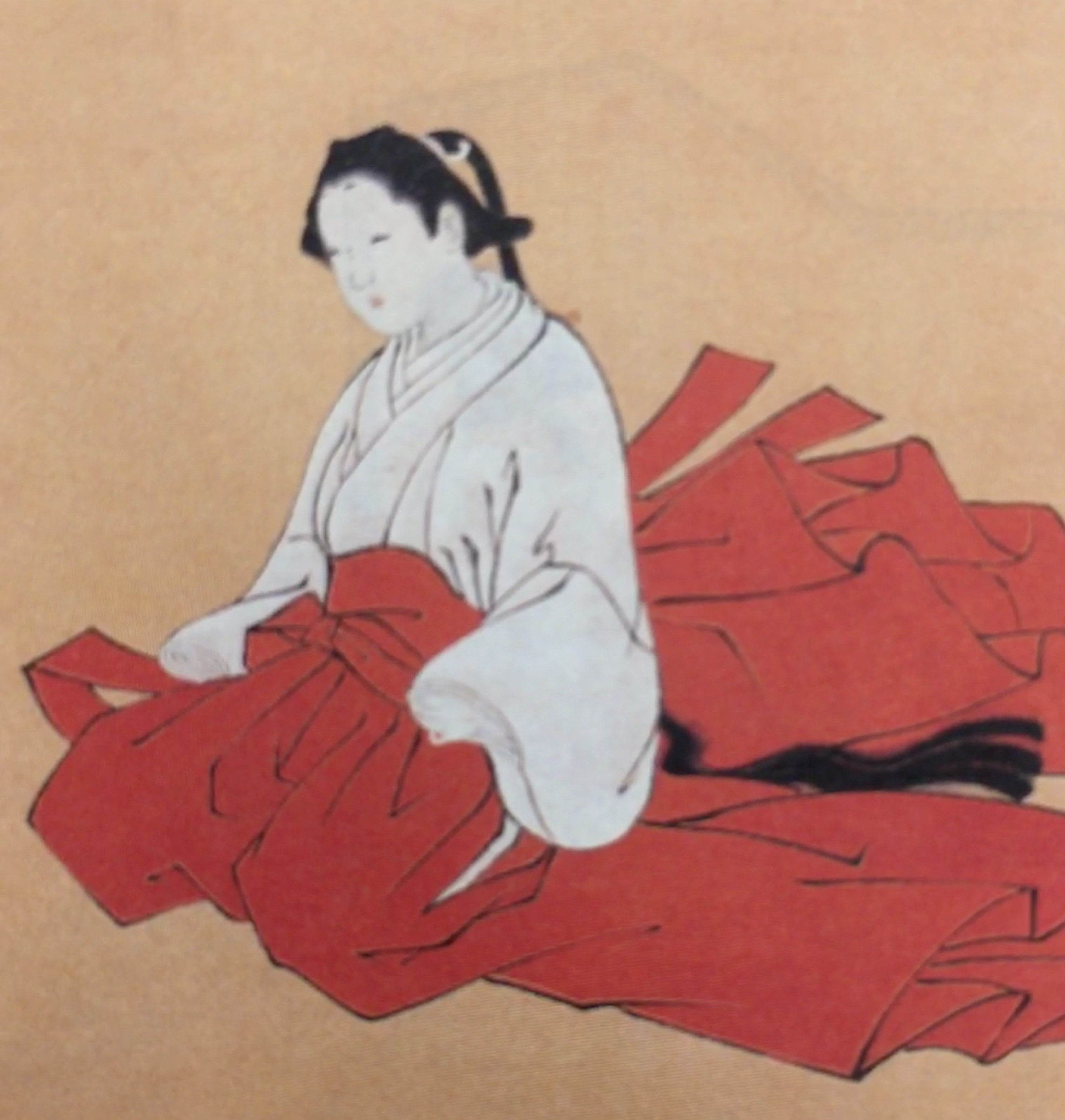 長松院(冬姫。久我通名の女、久我通誠養女、伊達吉村の正室)の肖像。